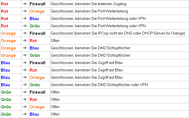 Traffic-Beschreibung der Schnittstellen beim IPCop Rot = Internet Orange = DMZ Blau = WLAN Grün = LAN